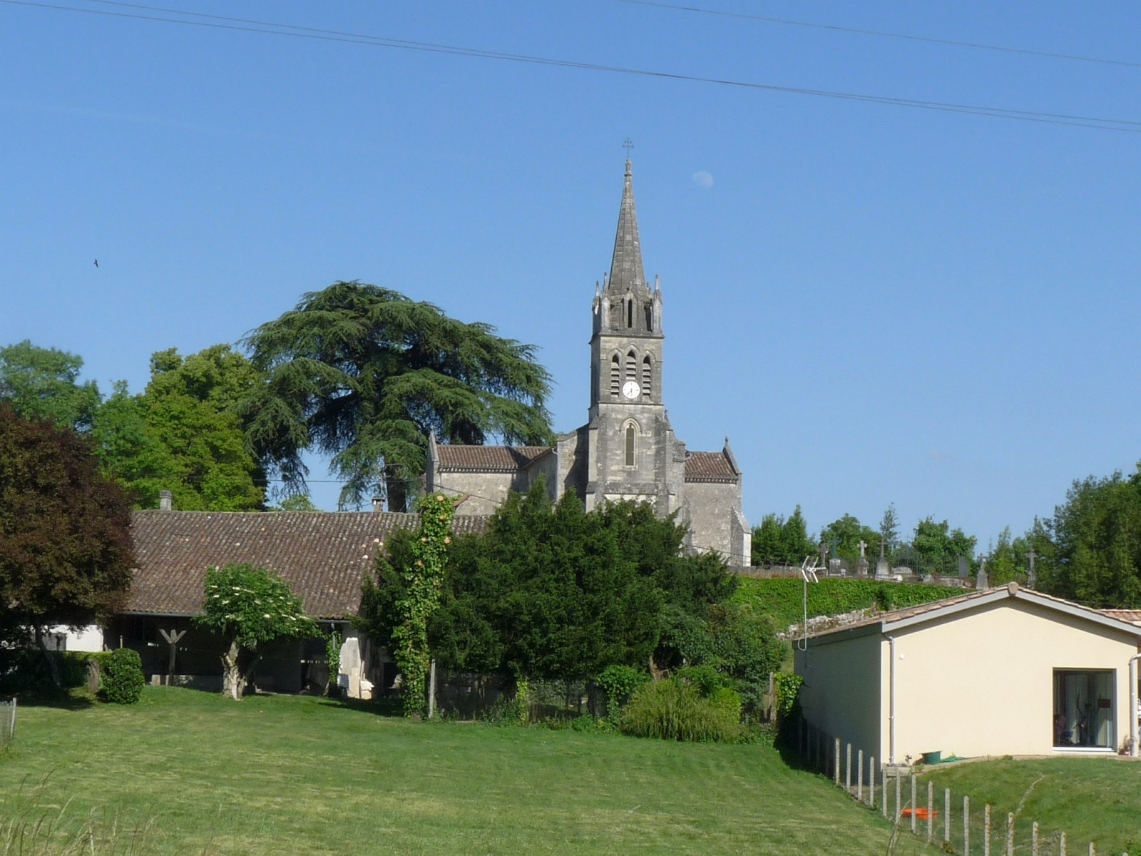 Bonzac, Gironde, France